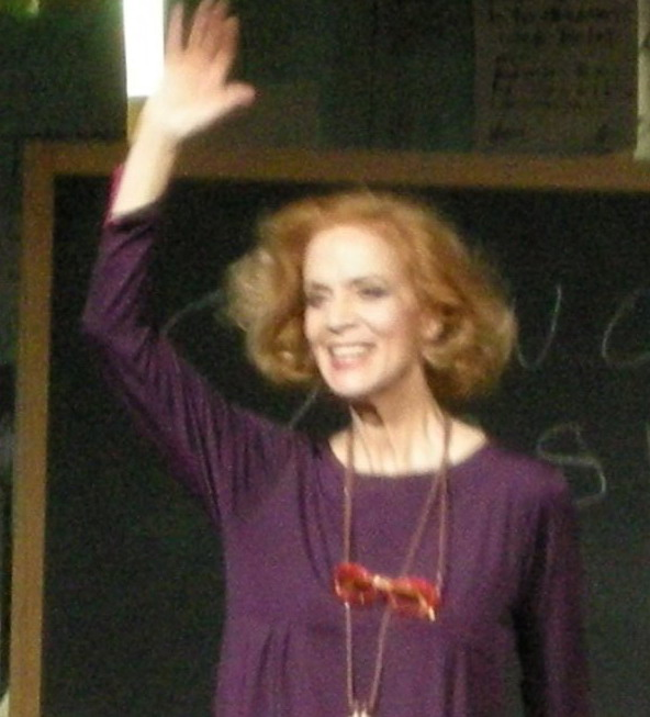 Lucia Poli